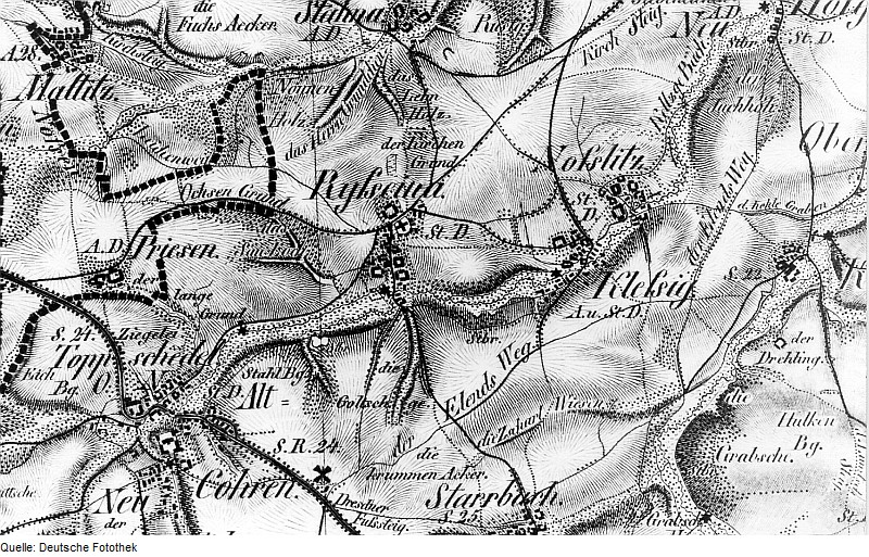 Original image description from the Deutsche Fotothek Ketzerbachtal-Rüsseina. Oberreit, Sect. Freiberg, vor 1843